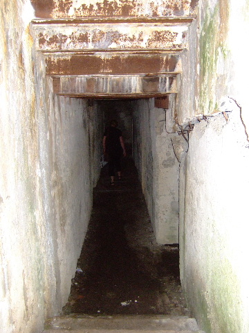 Wolfsschanze - Gang im Innern von Hitlers Luftschutzbunker